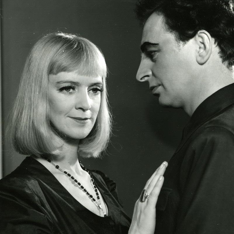 Kerstin Berger och Gösta Bråhner i Apollon från Bellac på Helsingborgs stadsteater